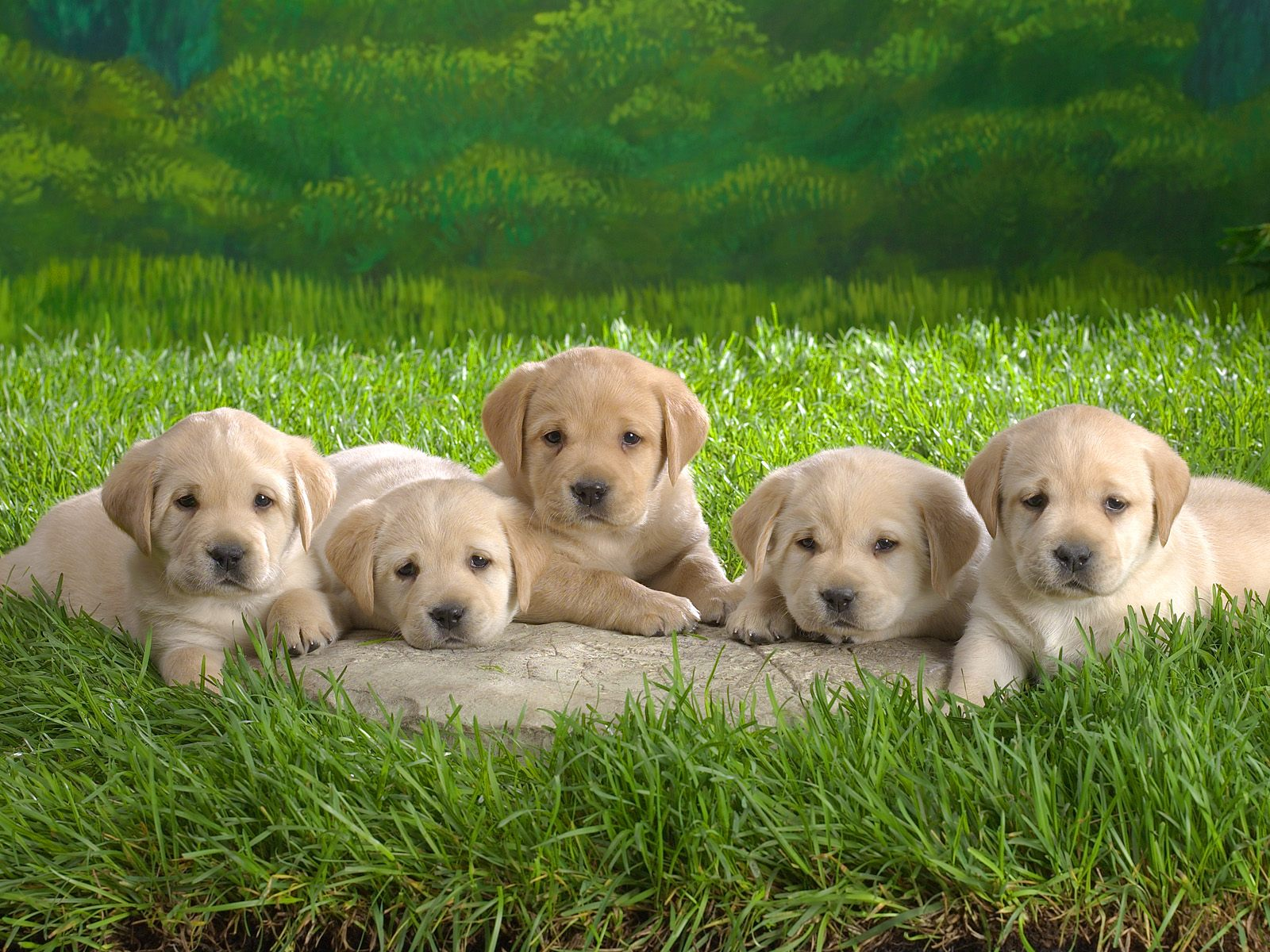 5 puppies, sitting puppies, green grass